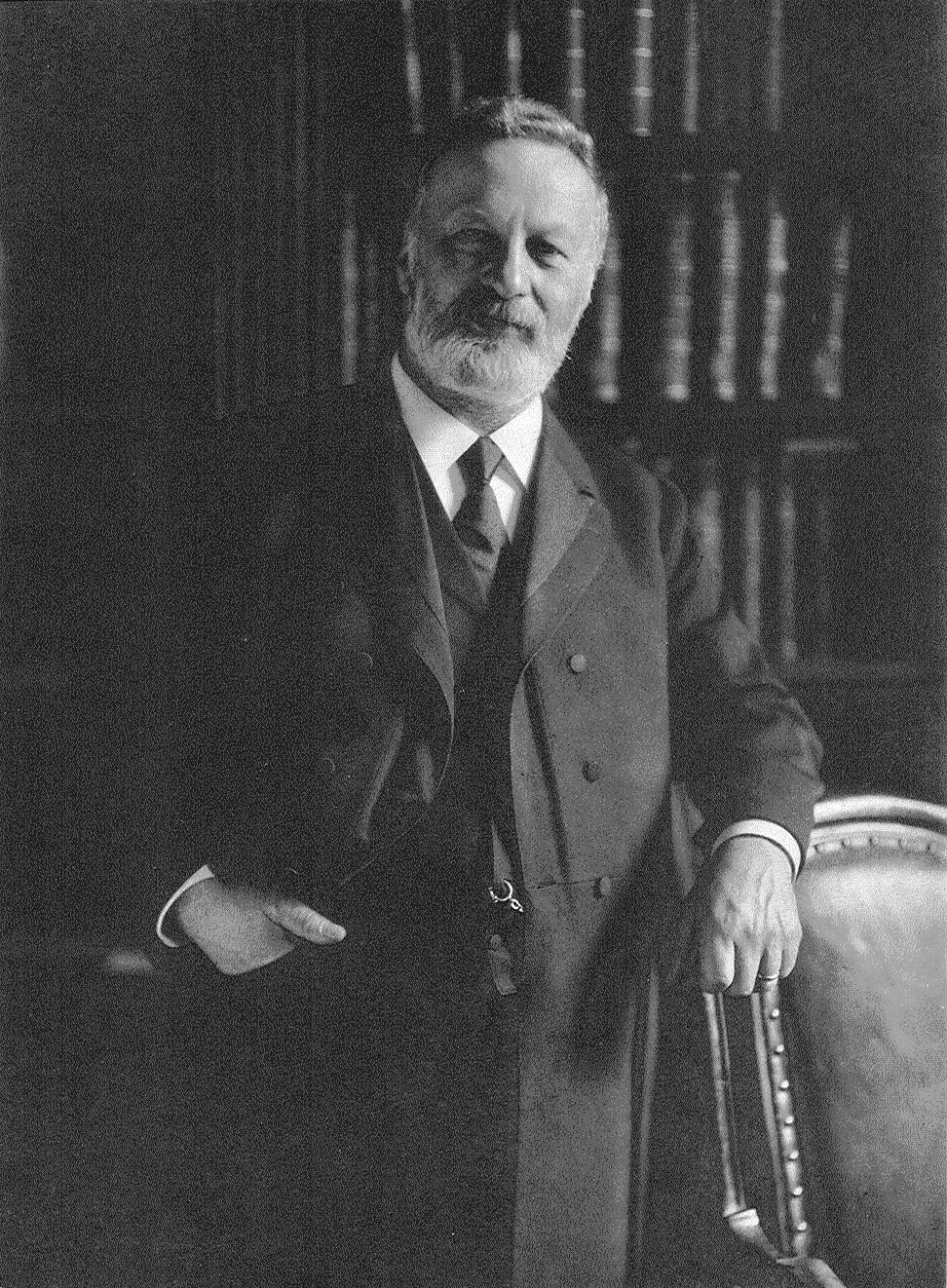 Albert Wolffson, Hamburger Rechtsanwalt und MdHB